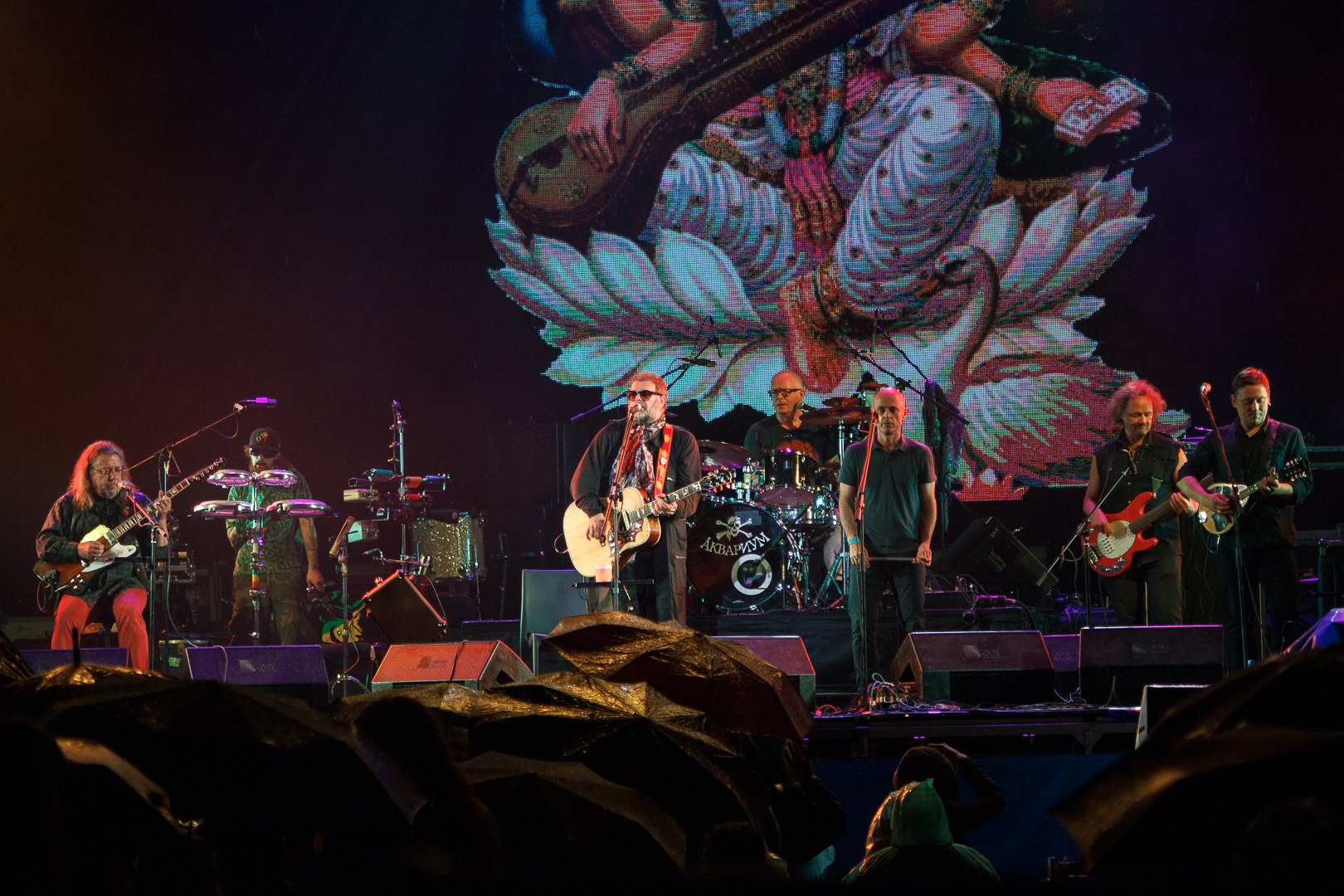 Борис Гребенщиков та група «Аквариум» на музичному фестивалі Atlas Weekend (8—10 липня 2016 року, Київ)